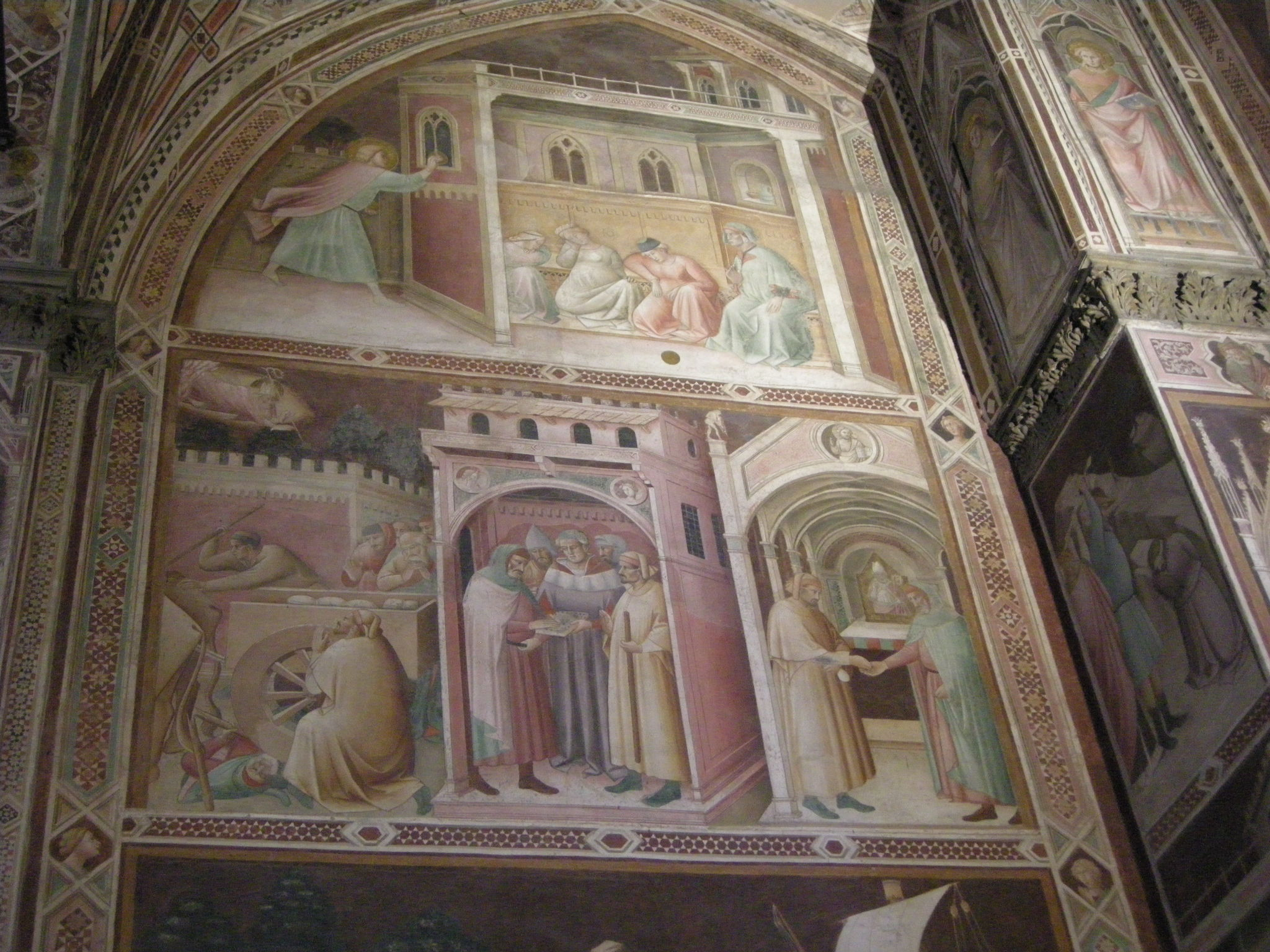 Cappella castellani 12